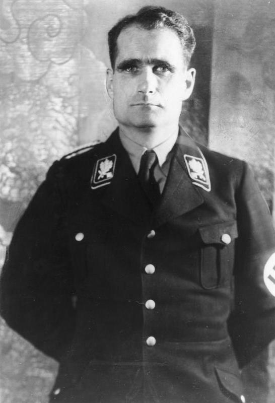 ADN-ZB-Archiv Rudolf Hess, Nationalsozialist, seit 1933 Reichsminister ohne Geschäftsbereich und seit 1939 Mitglied des Ministerrates für Reichsverteidigung, Stellvertreter Adolf Hitlers. geb. 24.4.1894 in Alexandria (Ägypten) gest. 17.8.1987 in Berlin-Spandau (Selbstmord) Aufn: 1935 14243-35